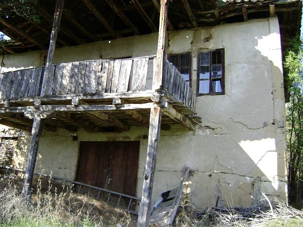 Eremia village, Bulgaria